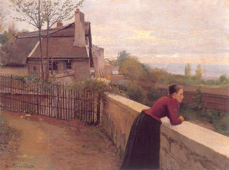 Banlieue